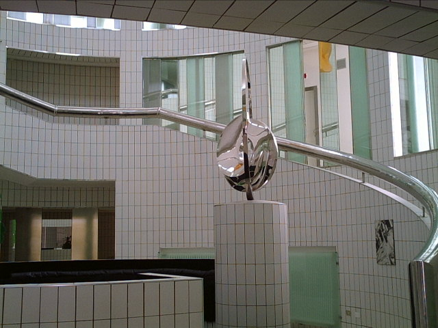 Casa museo Remo Brindisi This is a photo of a monument which is part of cultural heritage of Italy.